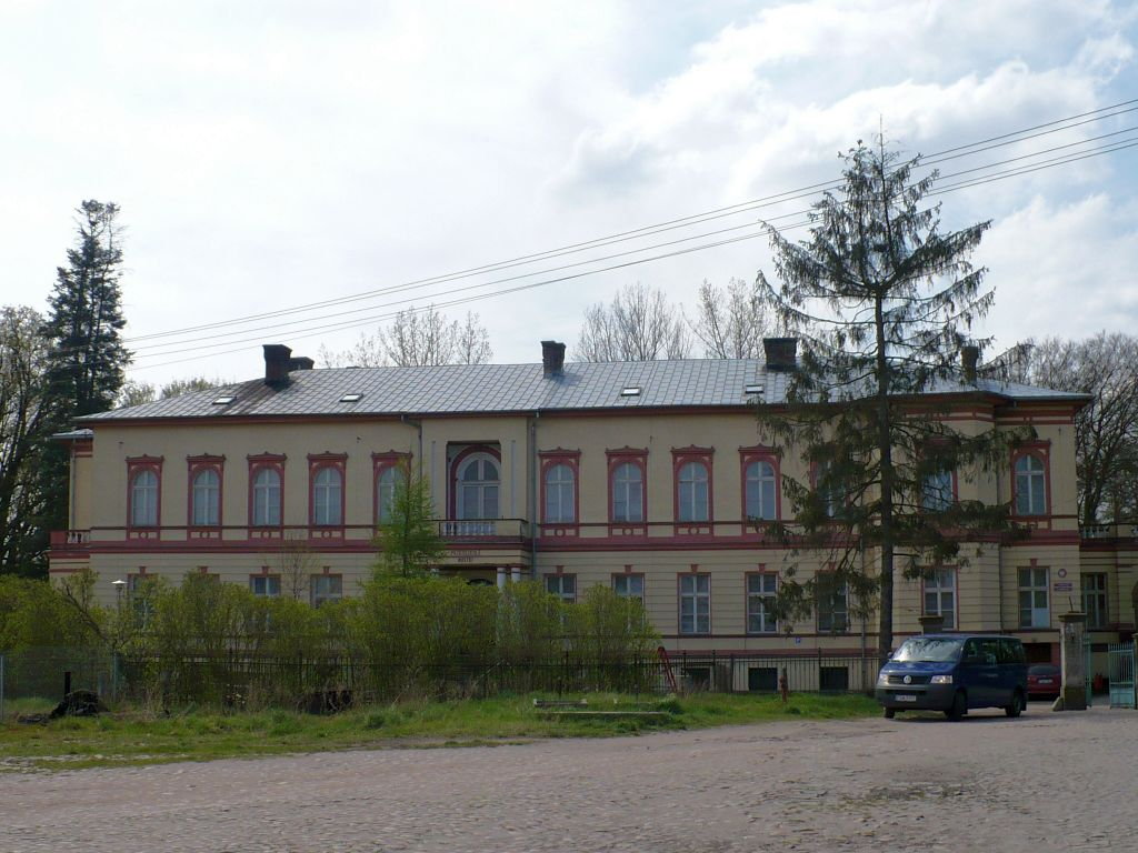 Pałac w Mostkach